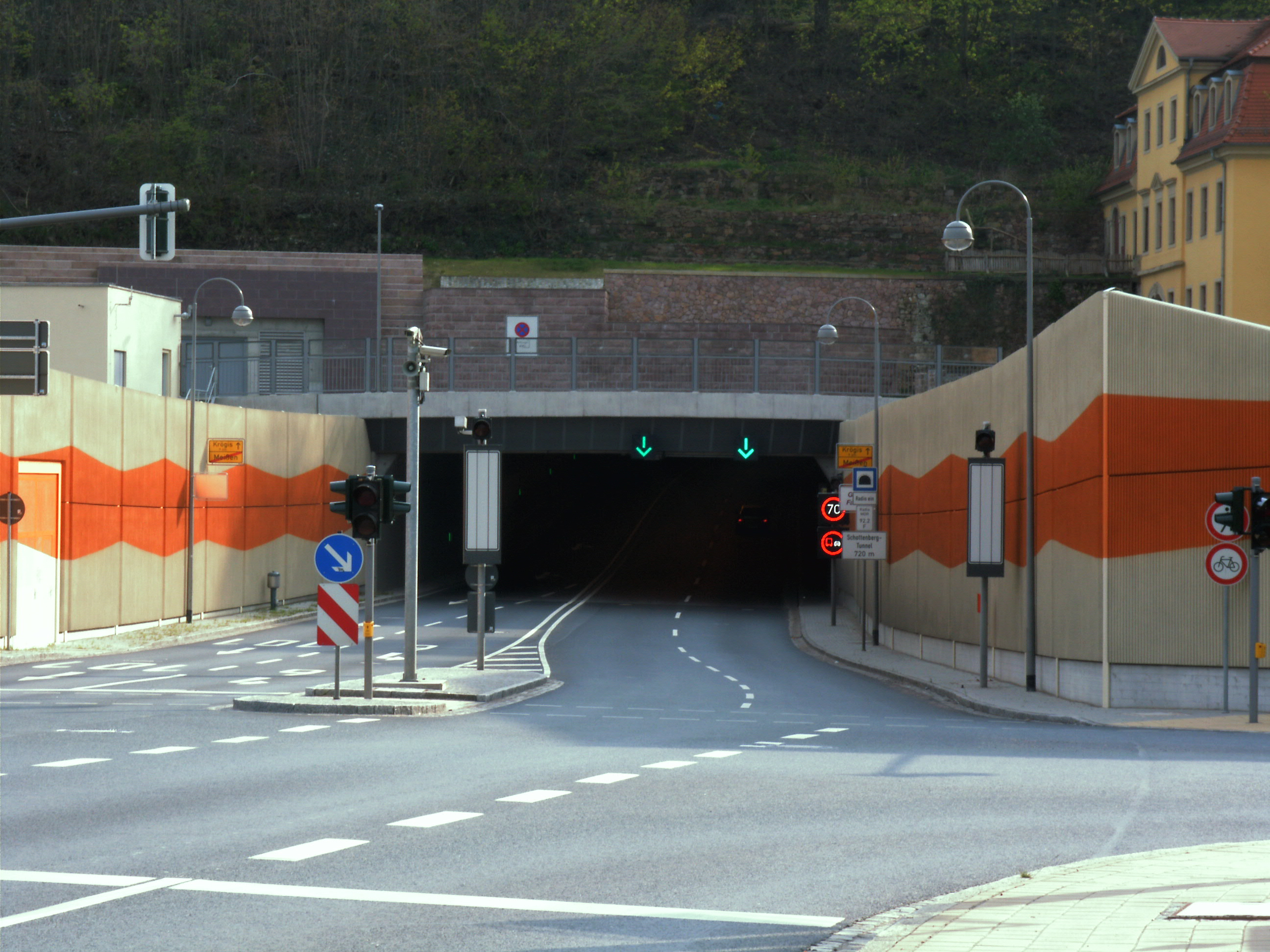 Elbseitige Einfahrt des Schottenbergtunnels. Der starke Anstieg des Tunnels ist zu erkennen.